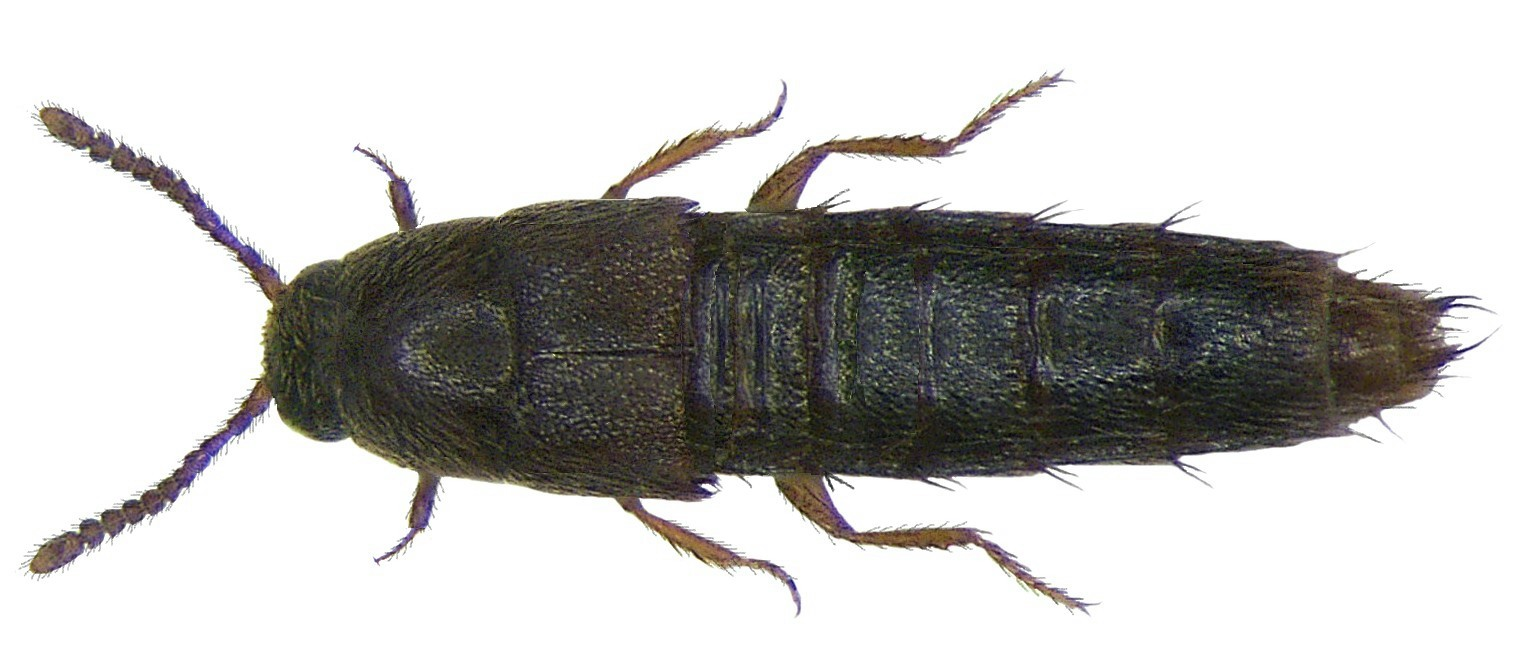 Familie: Staphylinidae Grösse: 2,2 mm Fundort: Kenia, Tsavo National Park leg. U.Schmidt, 1991; det. R.Pace, 2007 Foto: U.Schmidt, 2008